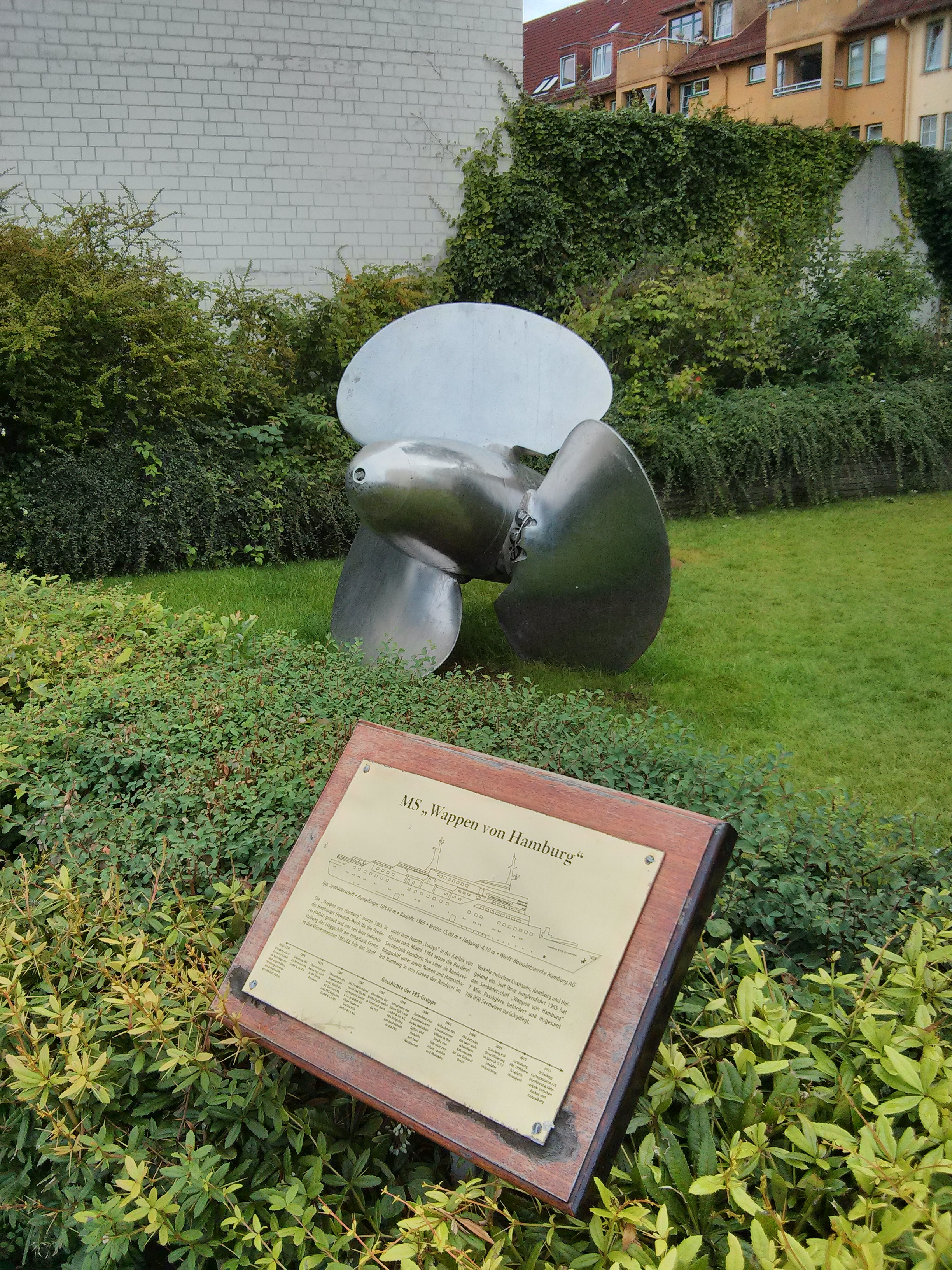 Propeller des Seebäderschiffes "Wappen von Hamburg" mit Gedenktafel in Flensburg